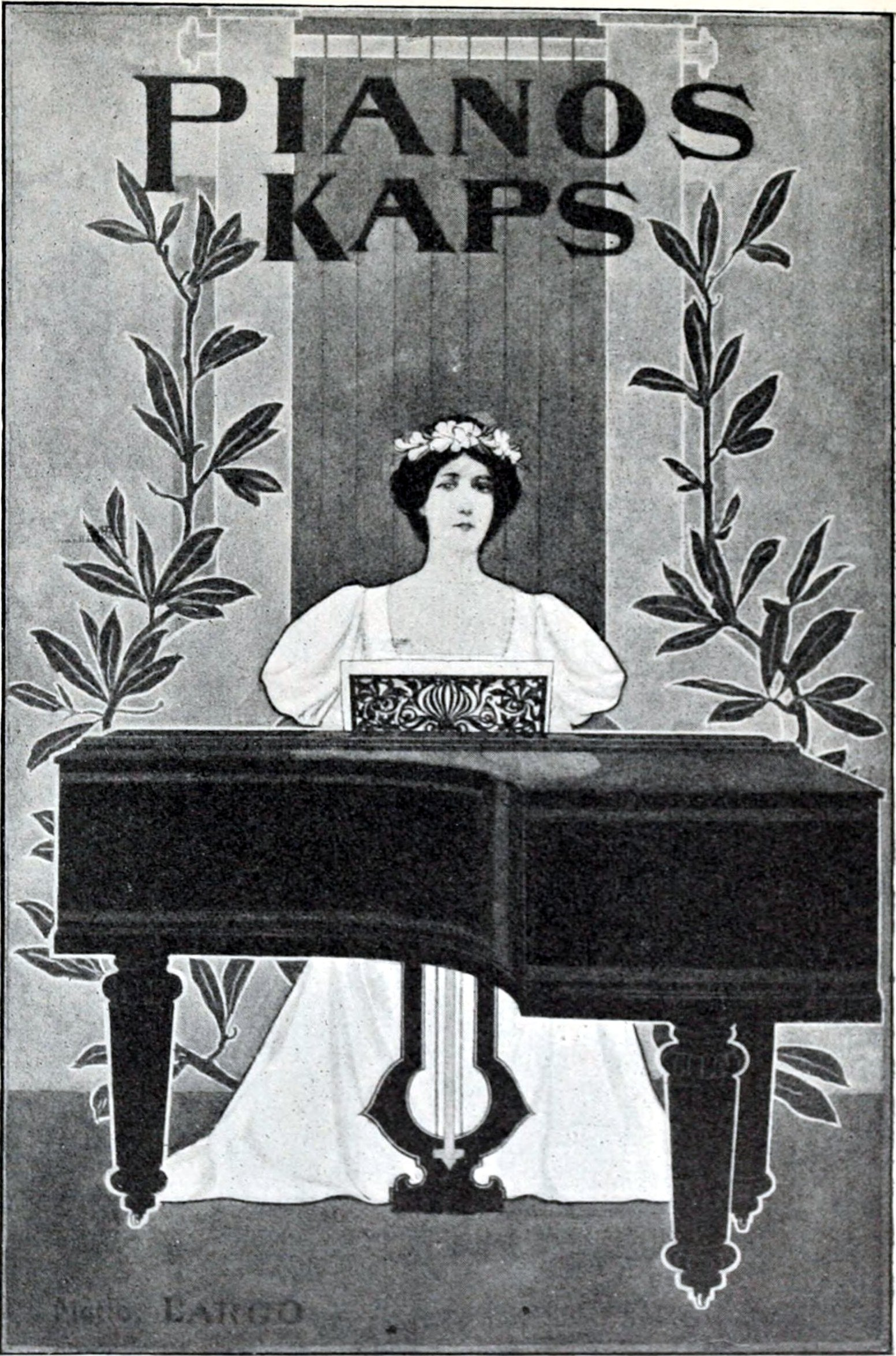 Motto Largo, Pianos Kaps, publicité